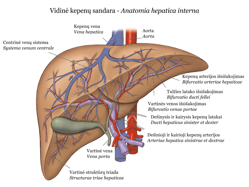 Iliustracijoje galima matyti vidinę kepenų sandarą. Užrašai yra lietuviški ir lotyniški.